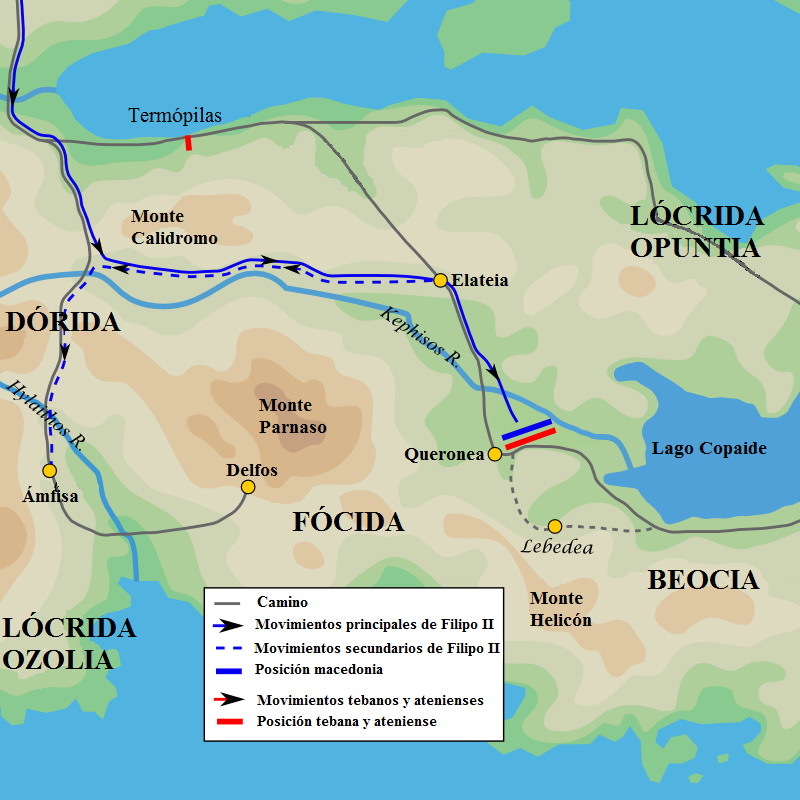 Mapa de la campaña de Filipo II en Grecia en el 339 a. C.